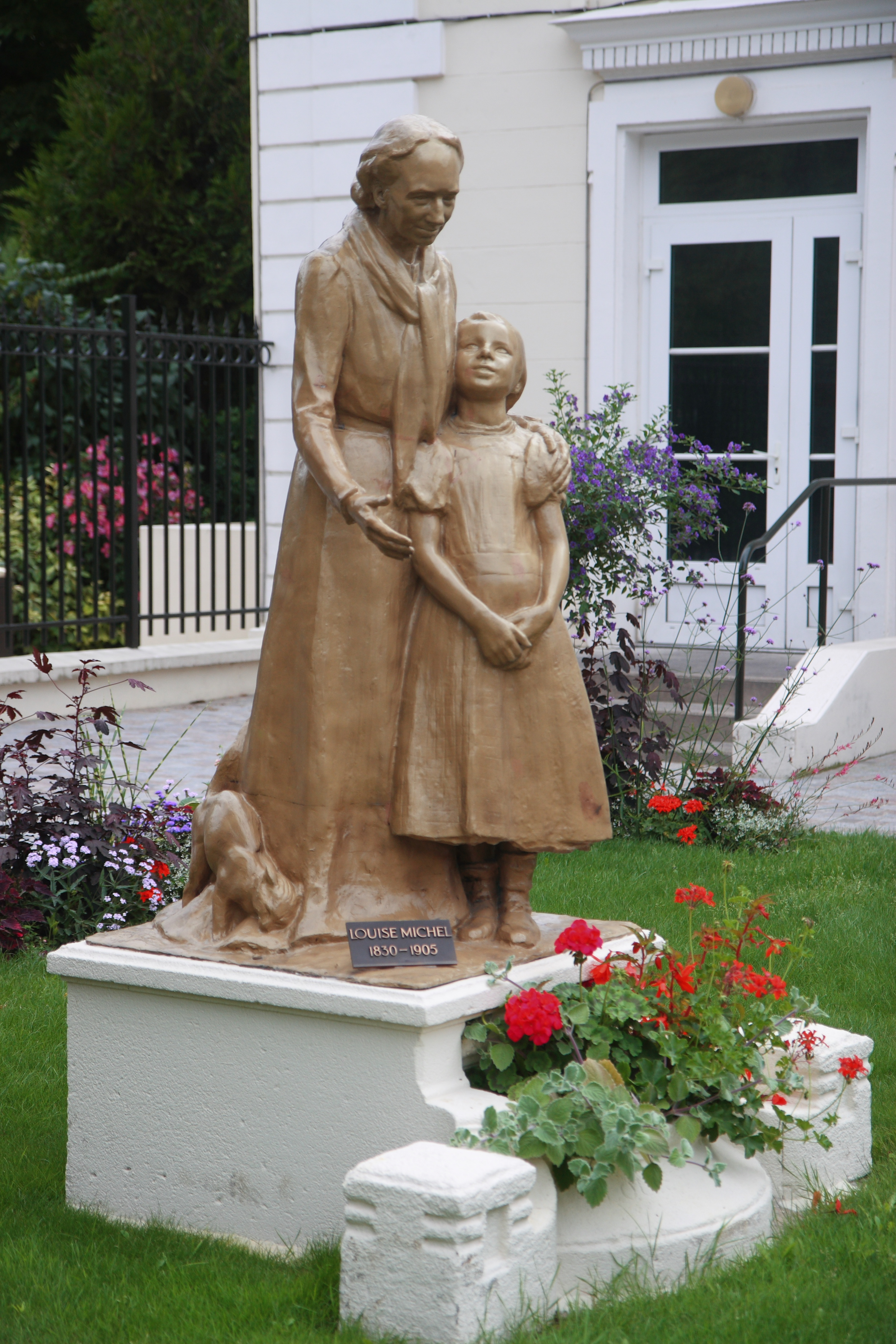 Émile Derré (1867-1938): Louise Michel, 1906, bronze, Levallois-Perret